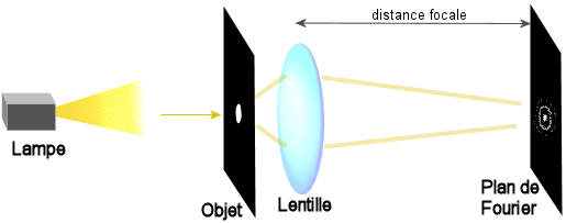 Schéma expliquant la formation de la transformée de Fourier d'un objet en Optique de Fourier. Image faite par mes soins : pas de copyright. Catégorie:Schéma de physique